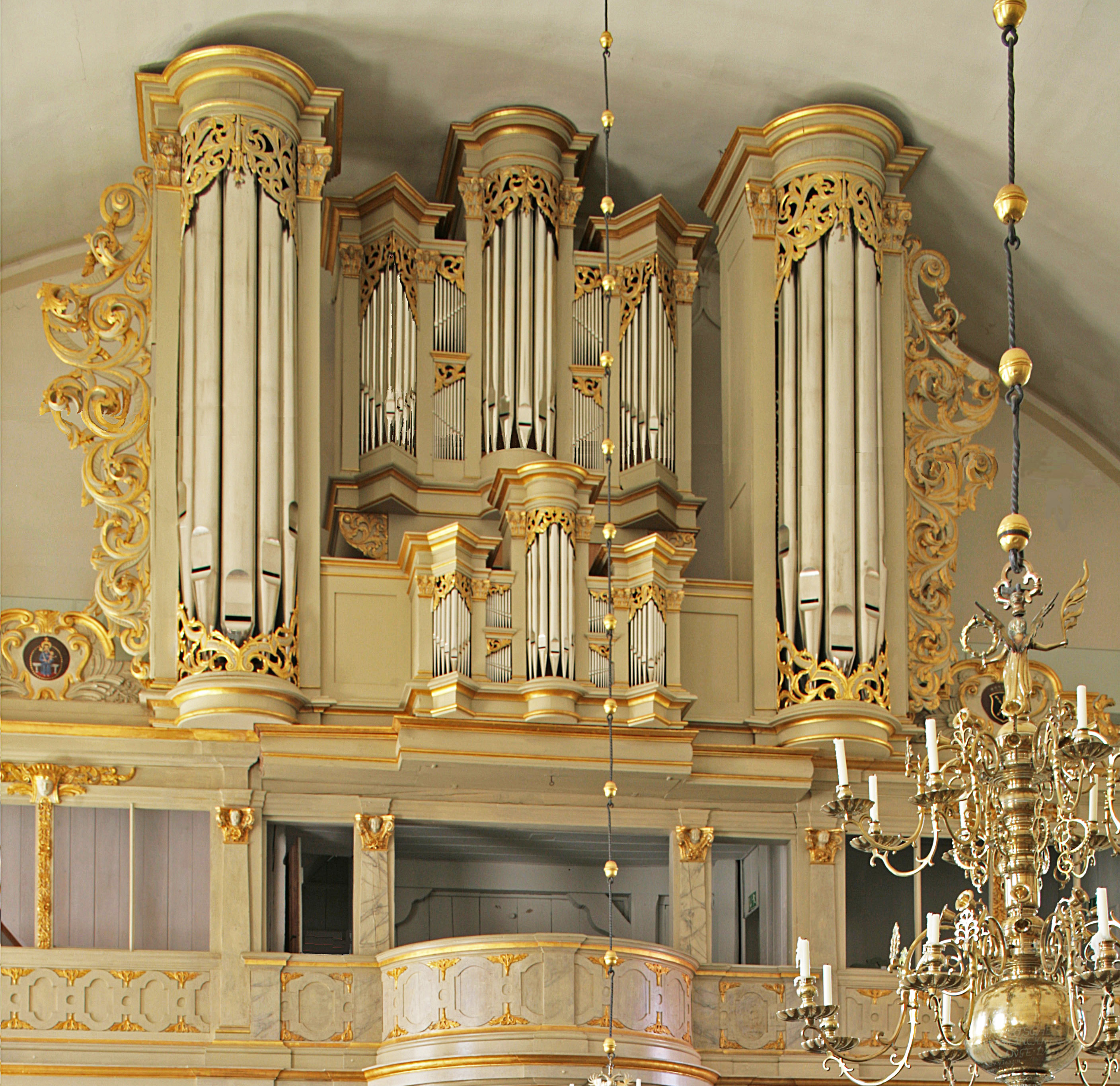 Orgel der Stadtkirche Preetz, Kreis Plön, Schleswig-Holstein, Deutschland